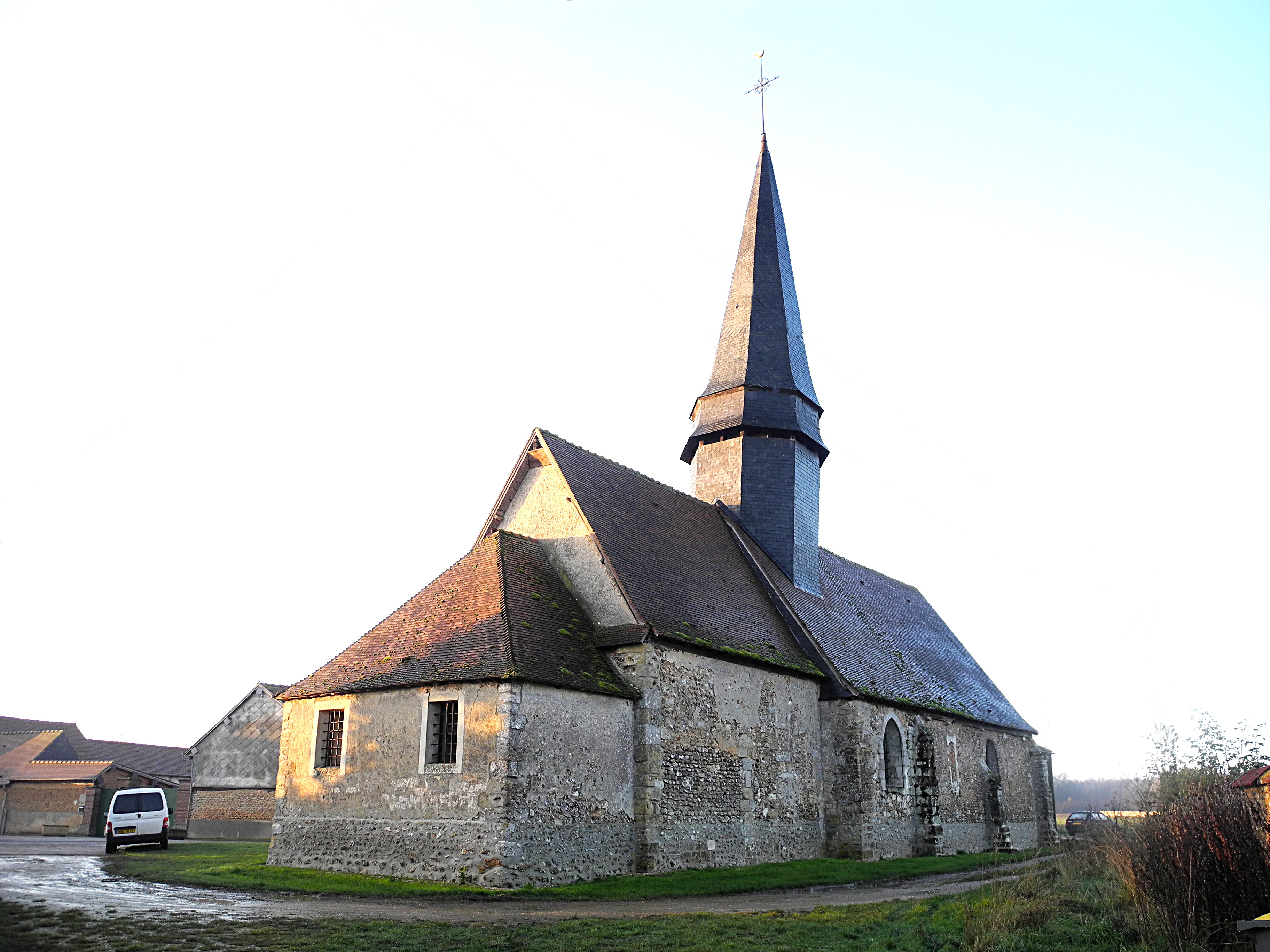 L'église du Cormier (Eure)